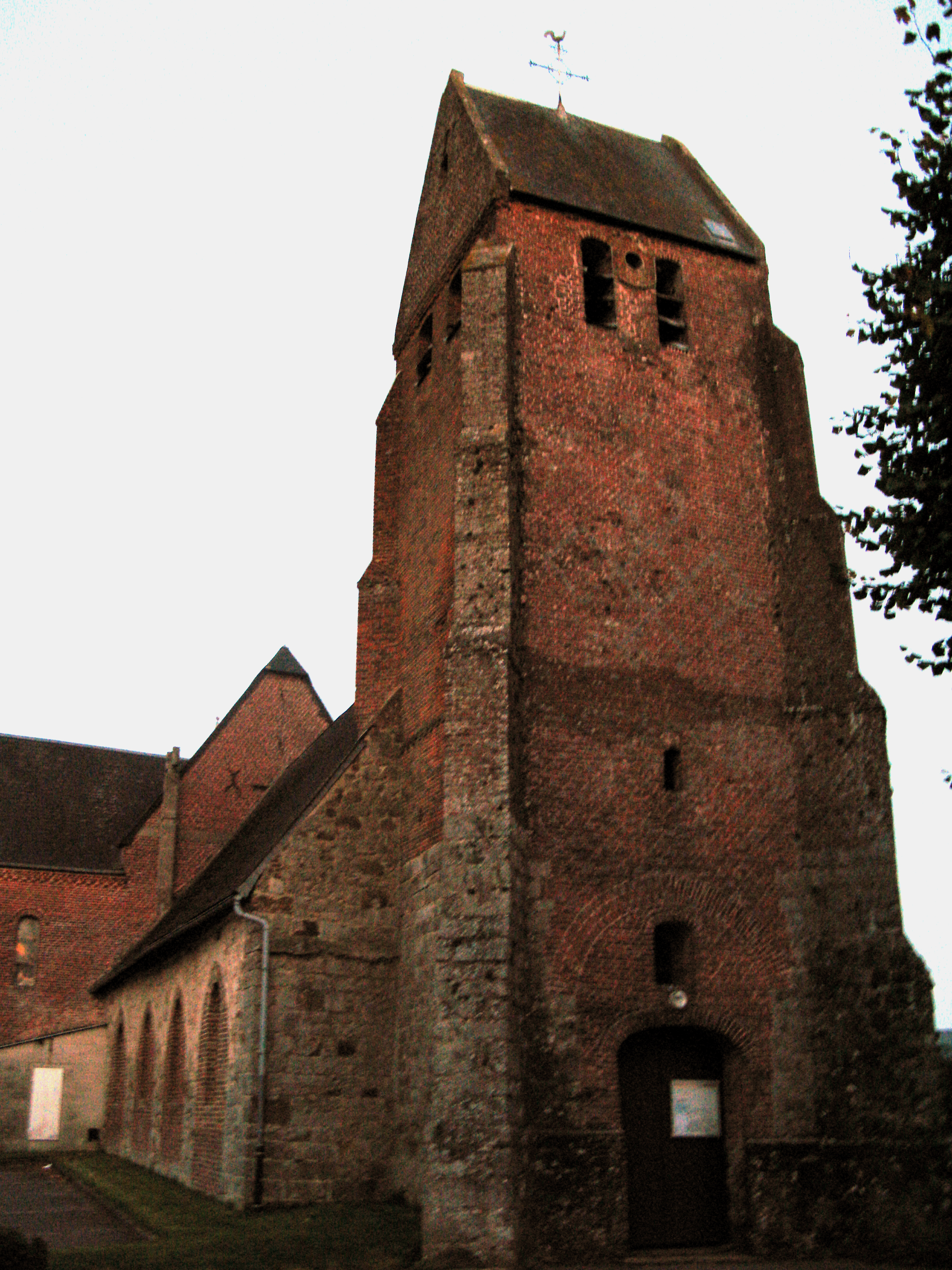 Laigny (Aisne, France) - L'église fortifiée (façade ouest du clocher, vue de nuit).